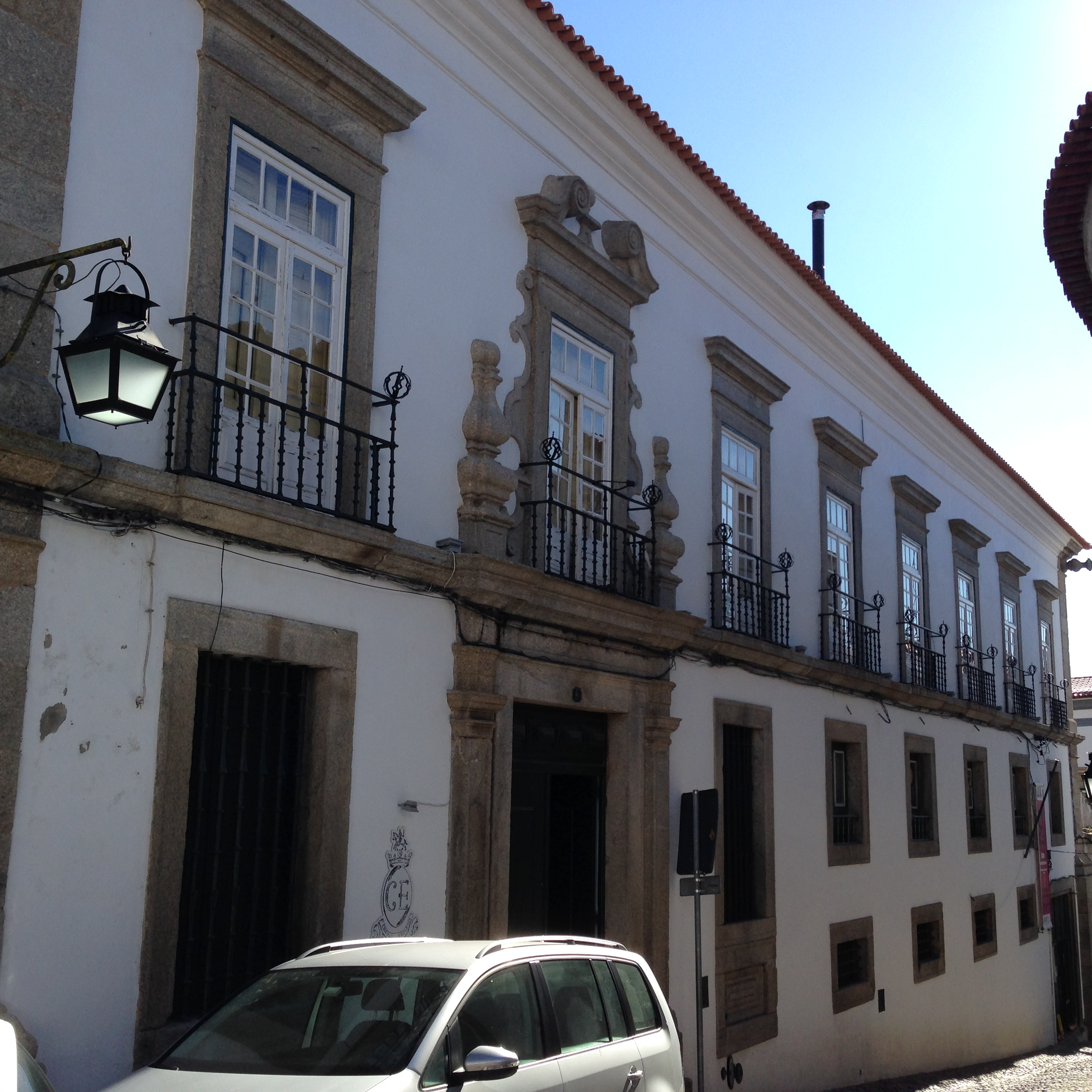 Edifício sede